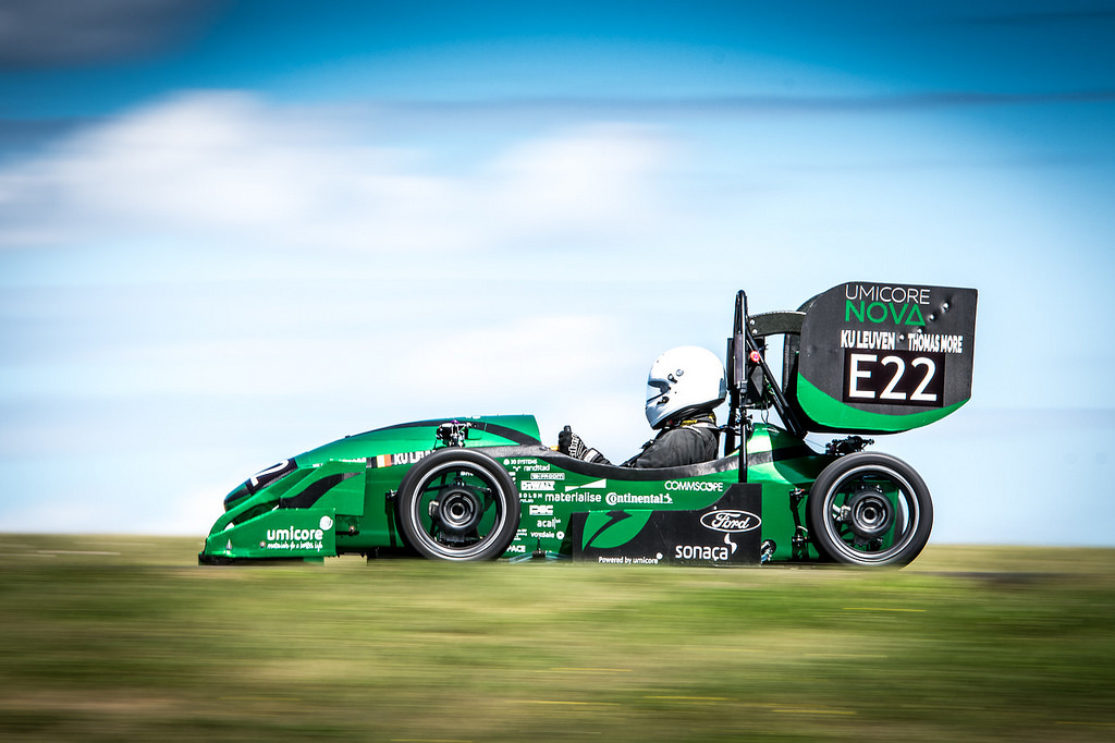 Dit is Umicore Nova, de derde auto van het raceteam Formula Electric Belgium. Deze auto werd gebruikt in het Formula Student-seizoen 2017.